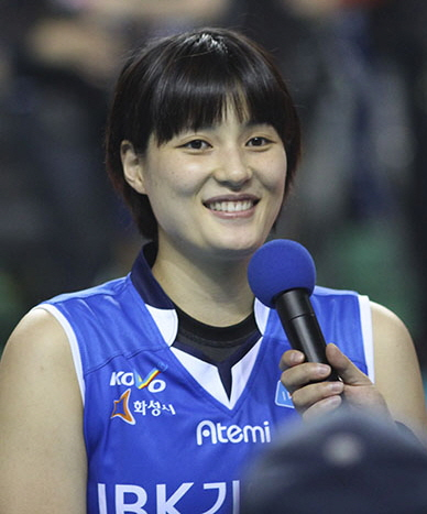 121121-IBK기업은행-vs-KGC인삼공사-경기-김희진